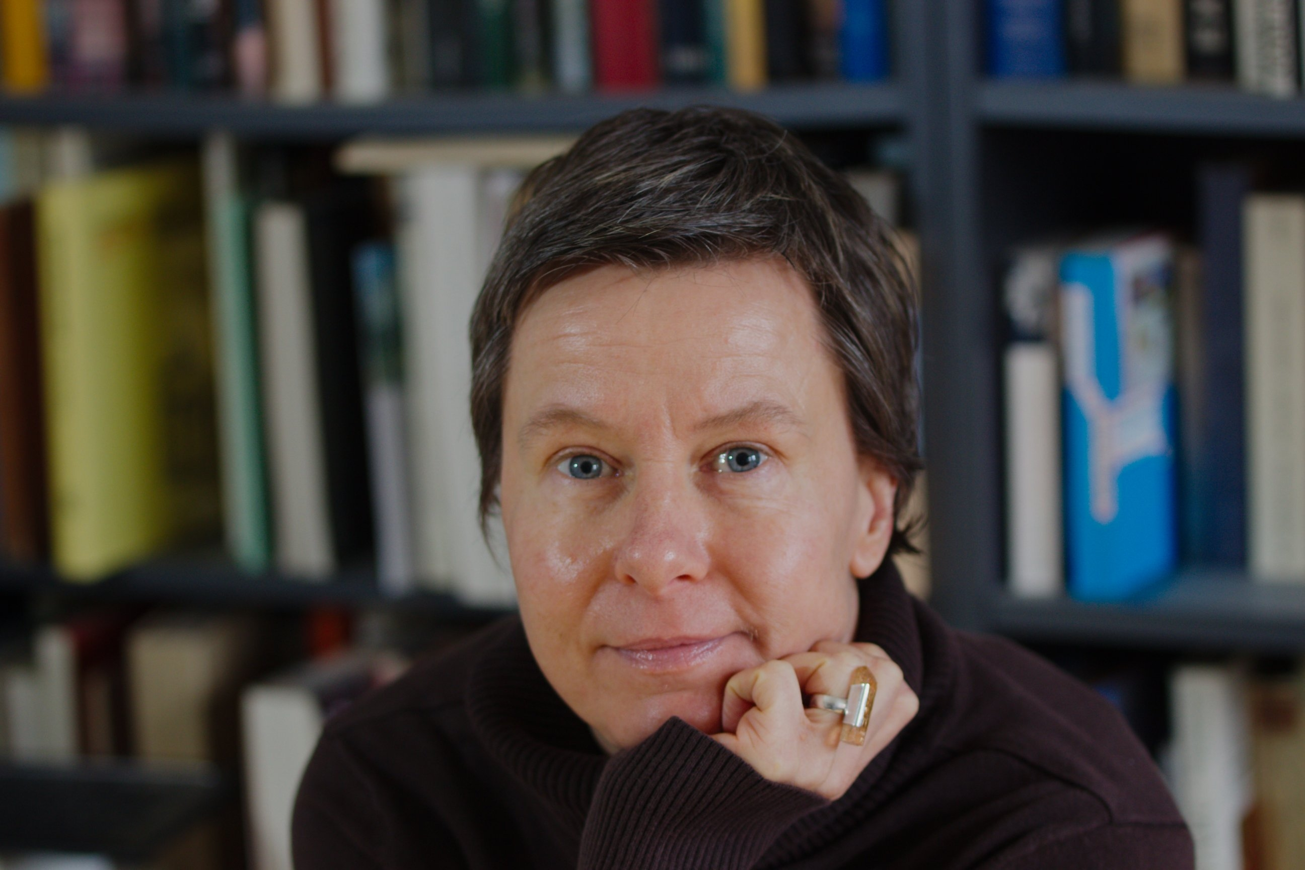 Poträtfoto